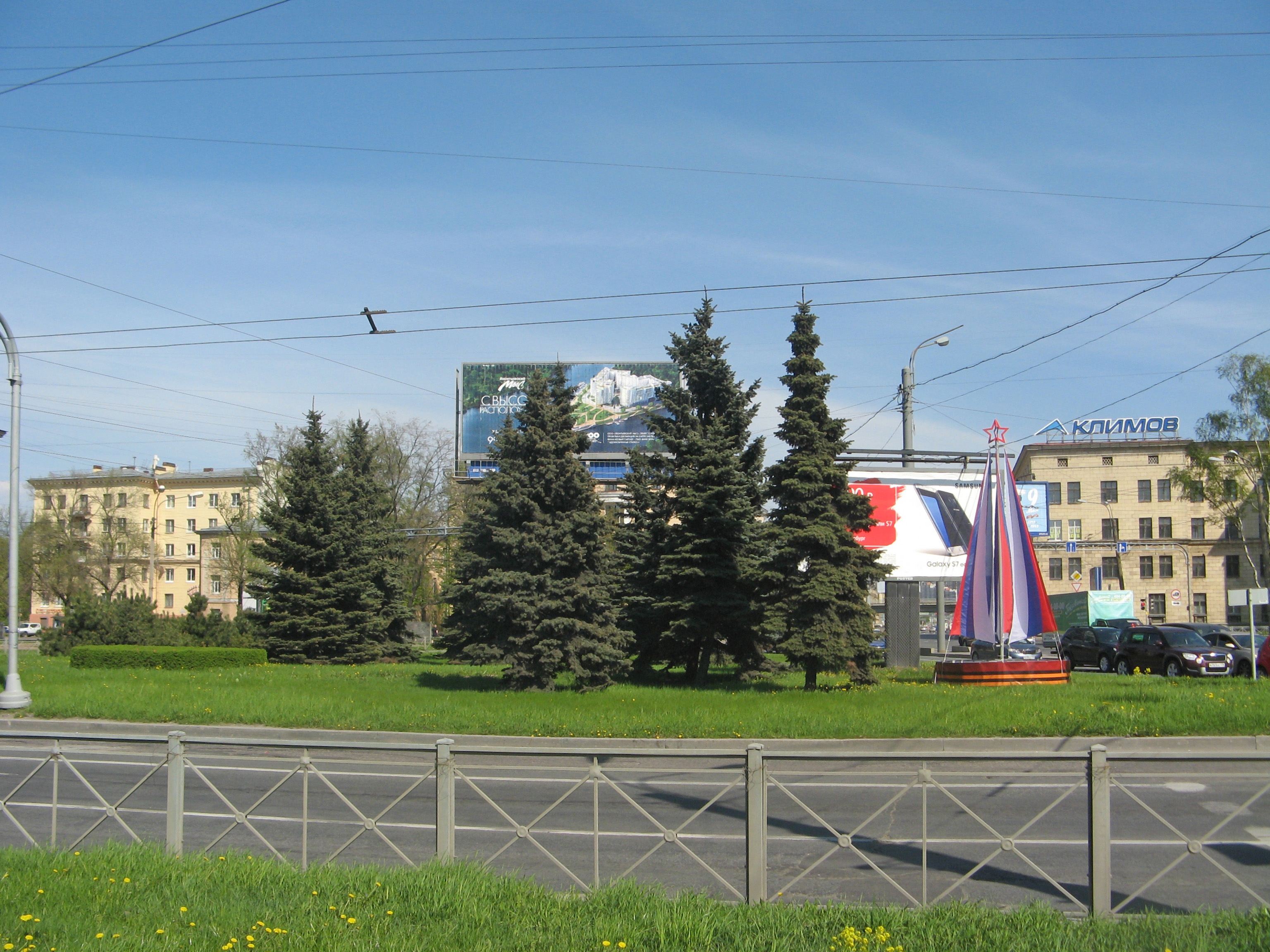 Санкт-Петербург, пл. Академика Климова